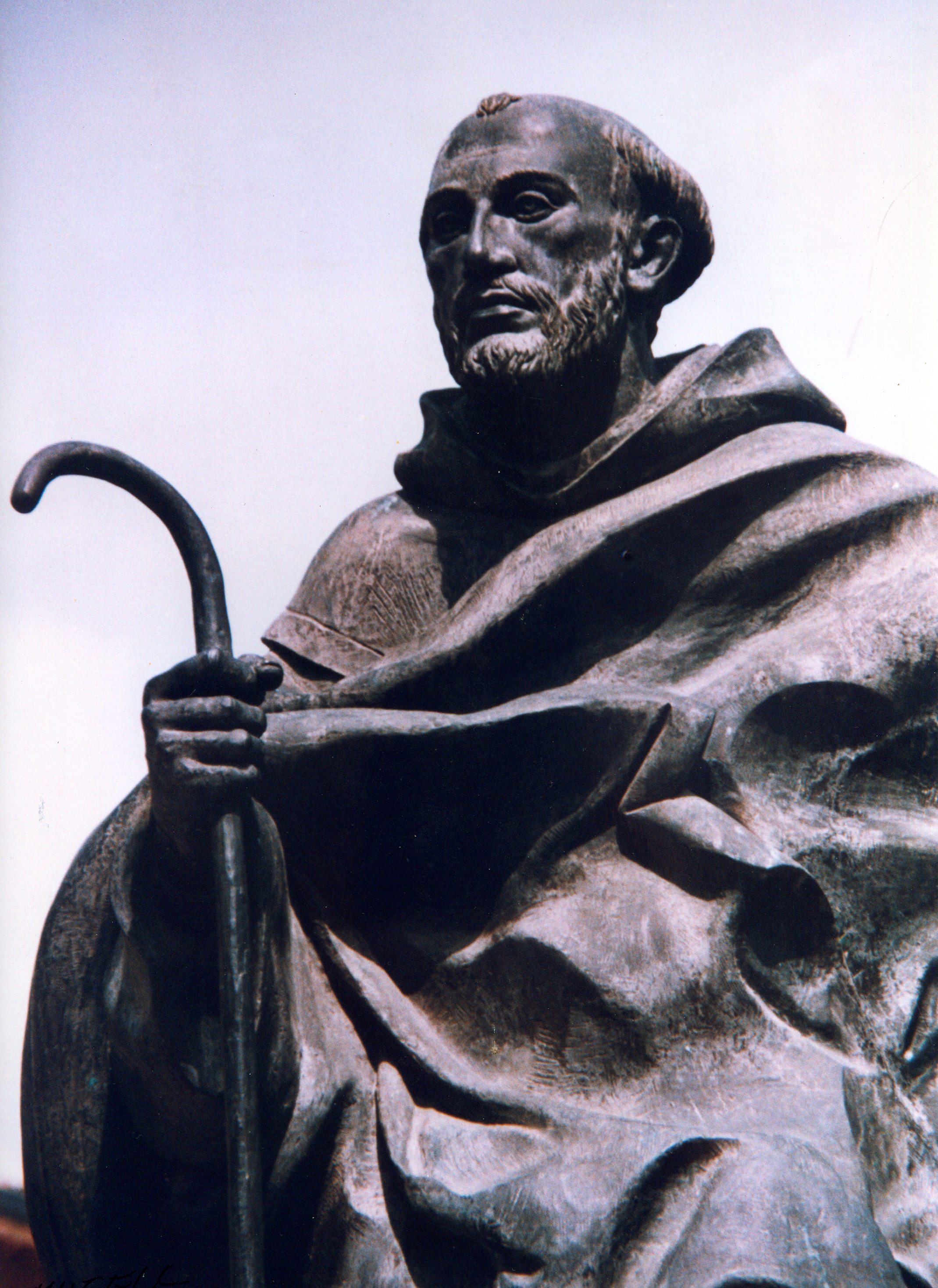 "A San Juan de la Cruz" (detalle). Autor: Rafael Pi Belda. Tamaño: 2m de alto (sobre un pedestal de 3 metros). Material: bronce. Caravaca de la Cruz (Murcia).